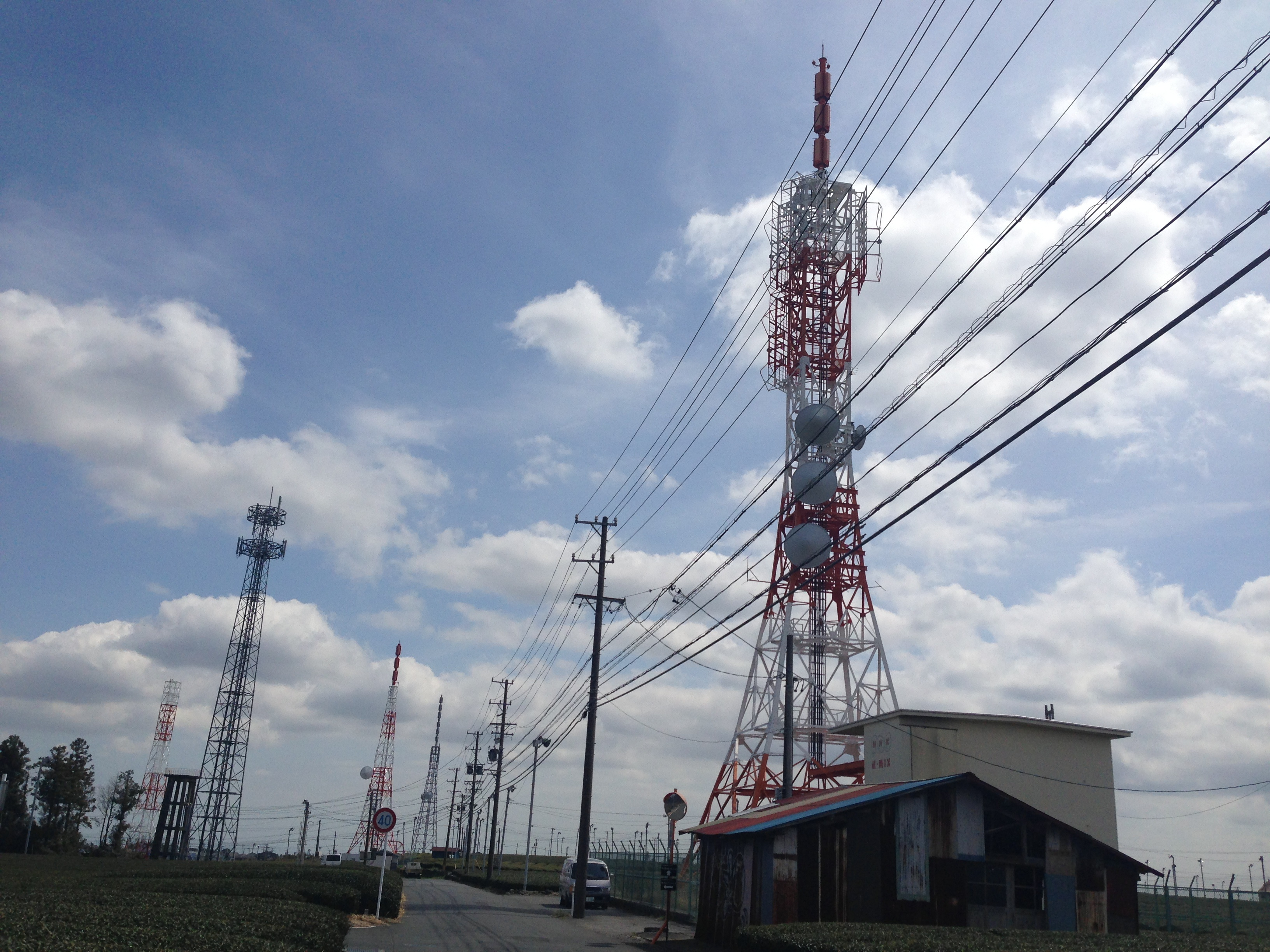 島田中継局の鉄塔群。東向きに撮影。